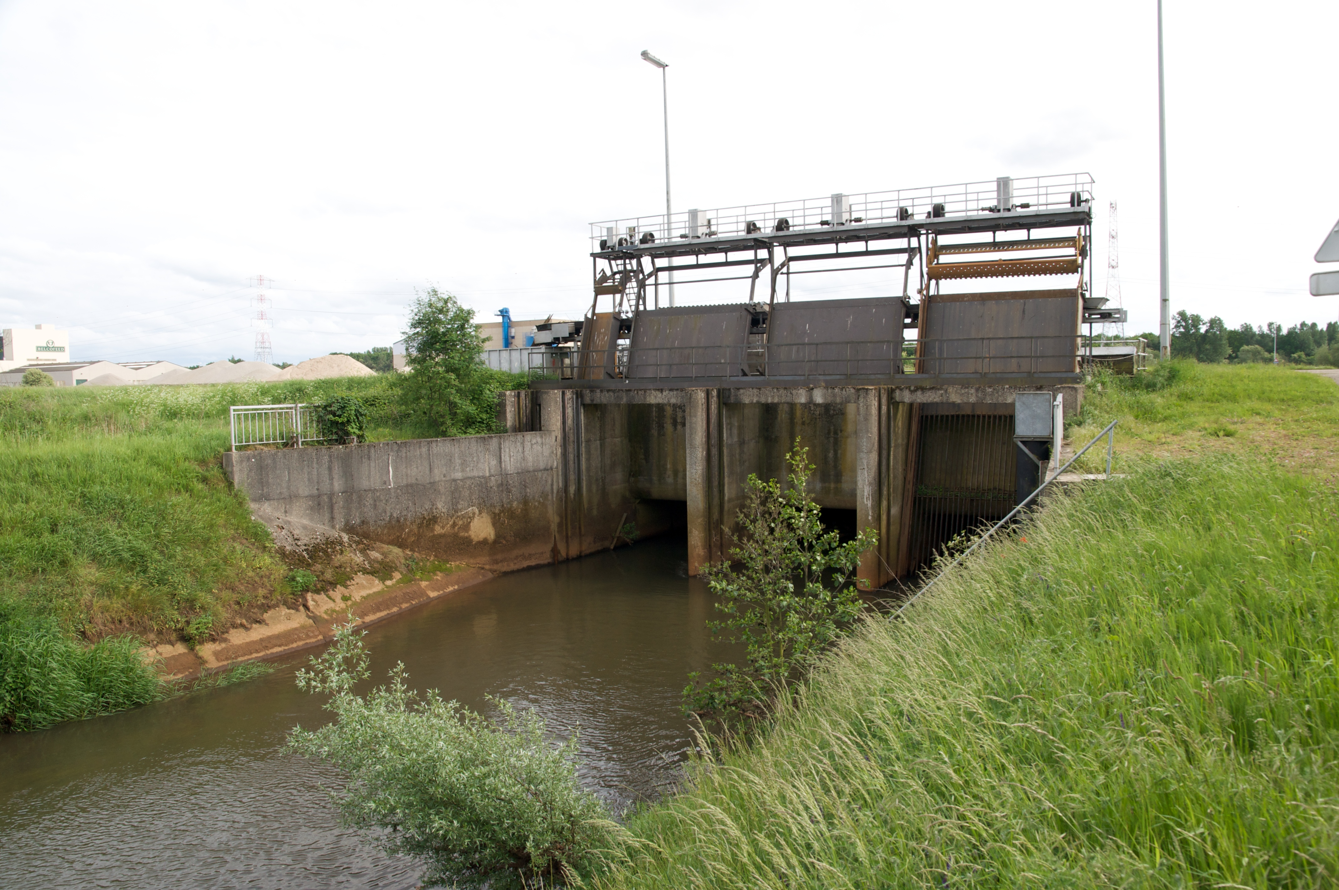 Grobbendonk (Bouwel), België: De Kleine Nete vloeit uit de sifon onder het Albertkanaal